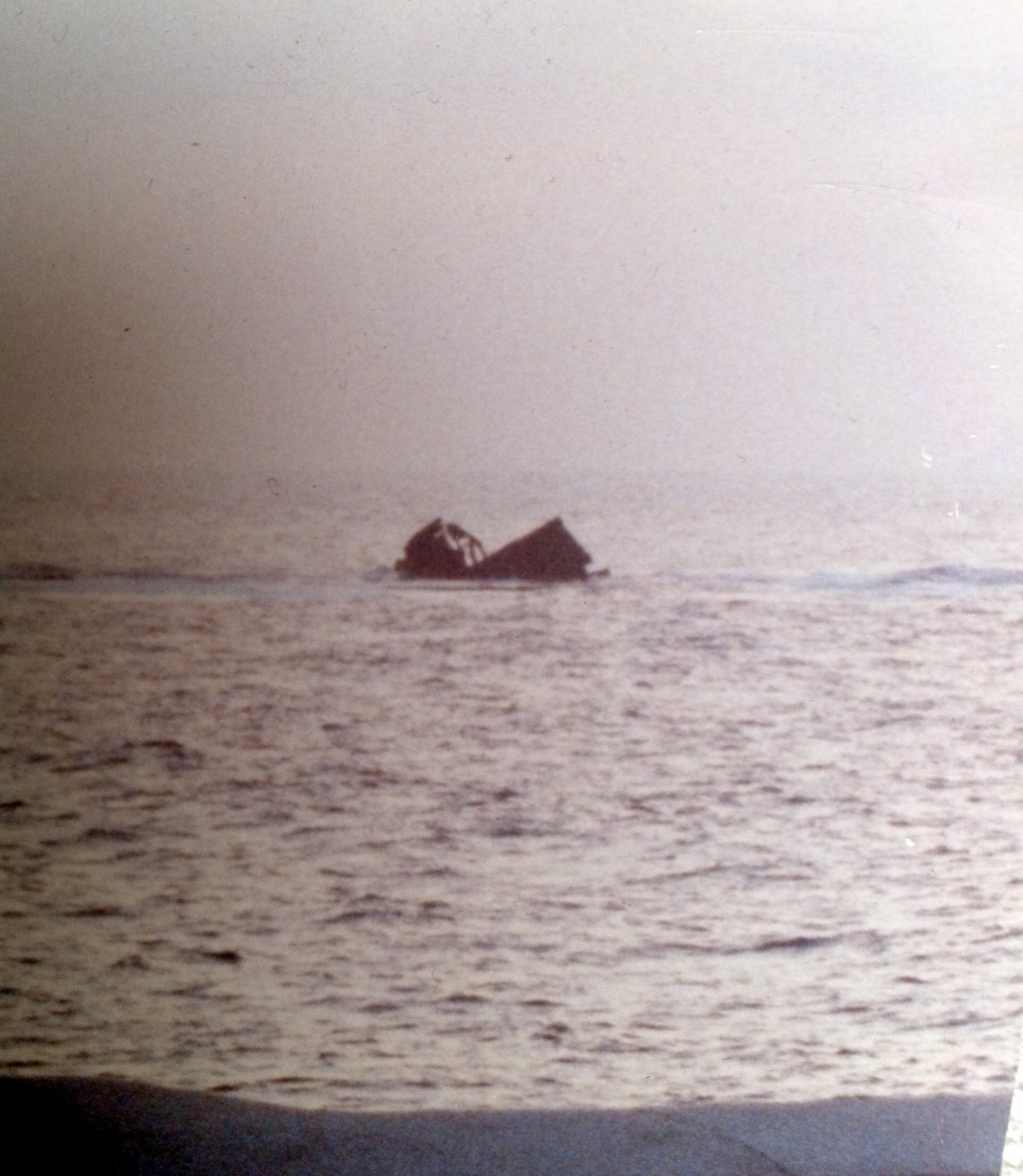 Il relitto del traghetto "Città di Trapani" nel 1998, naufragato nel porto di Trapani nel 1957